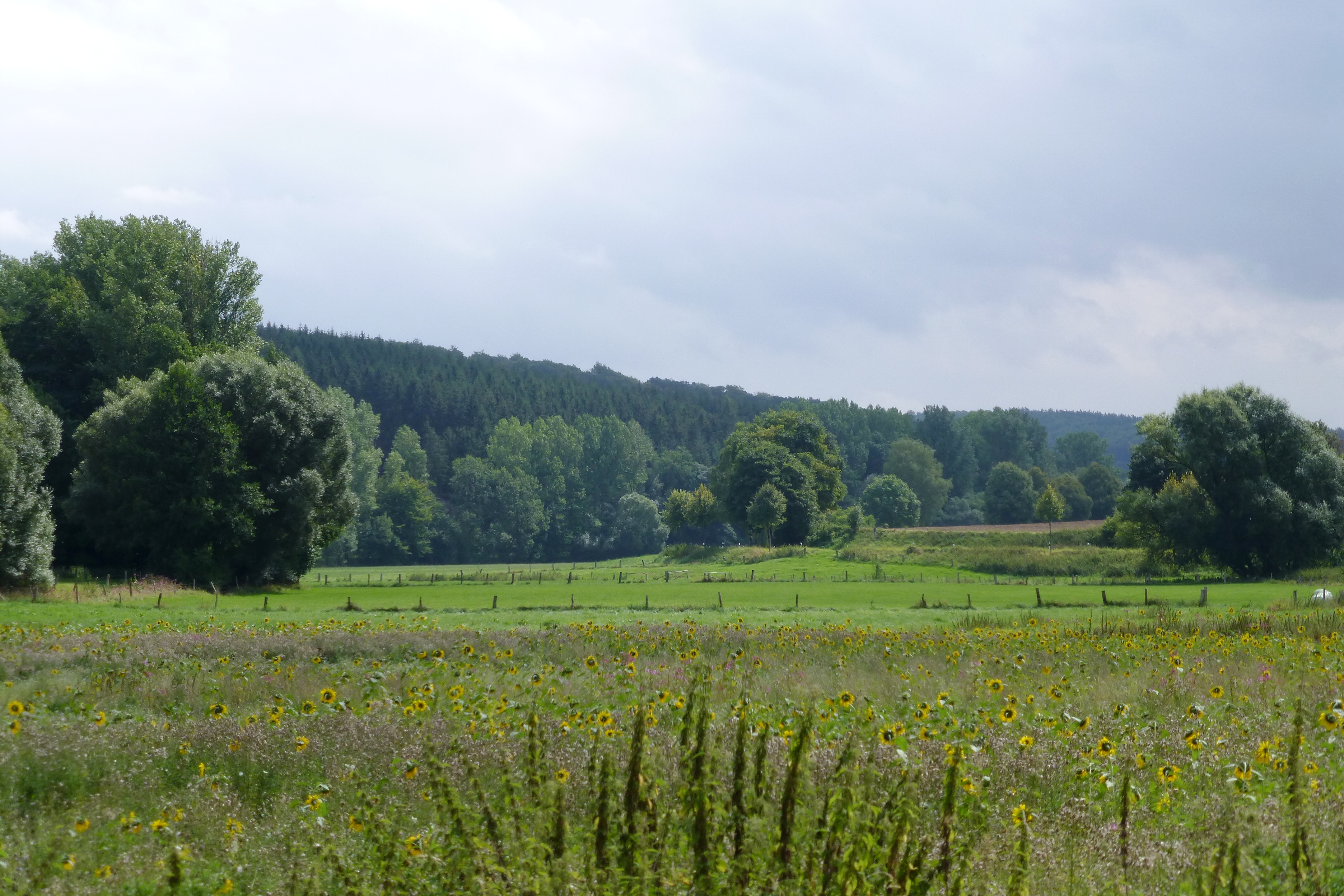 Gartetal südöstlich von Beienrode, Gemeinde Gleichen, Südniedersachsen.